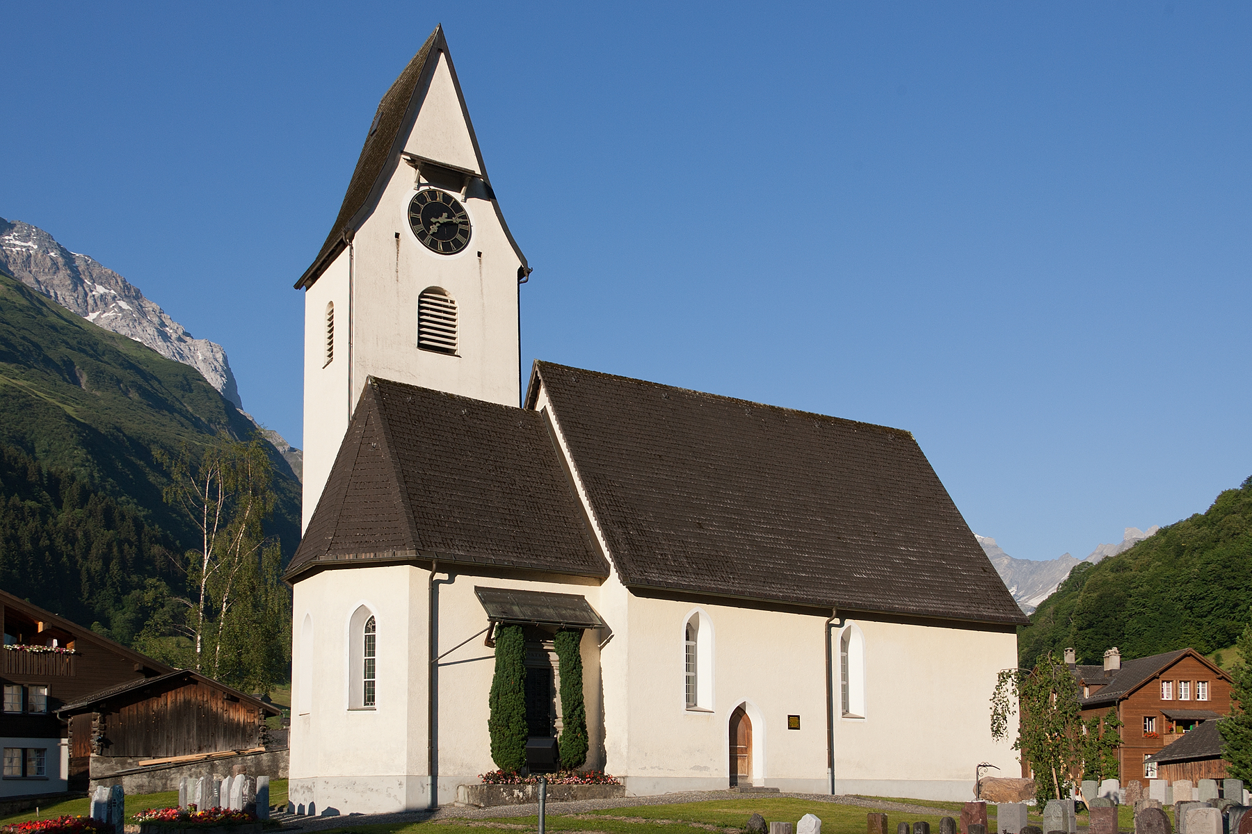 Reformierte Kirche in Elm (GL)